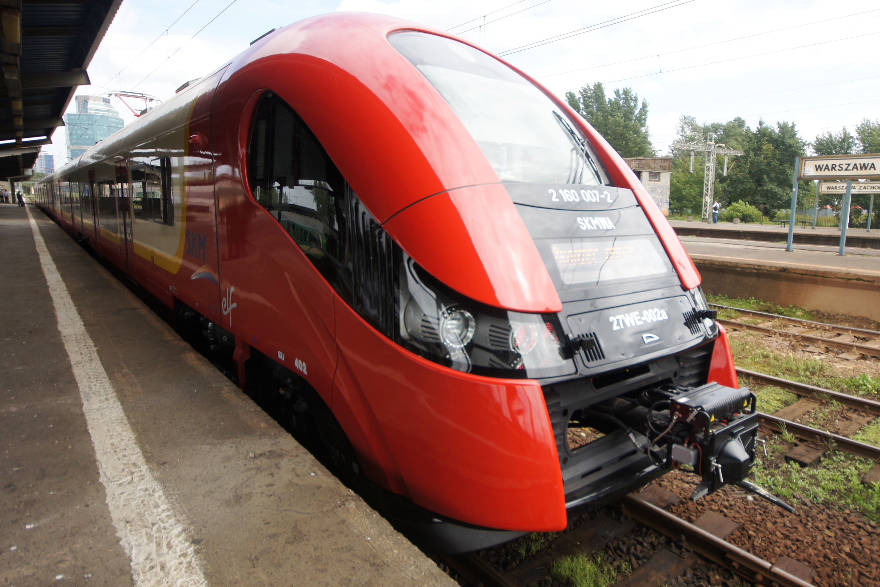 czoło pociągu Elf 27WE - SKM Warszawa